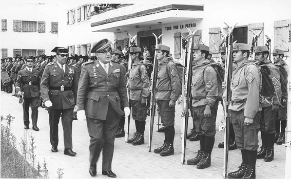 Desfile en Jaca